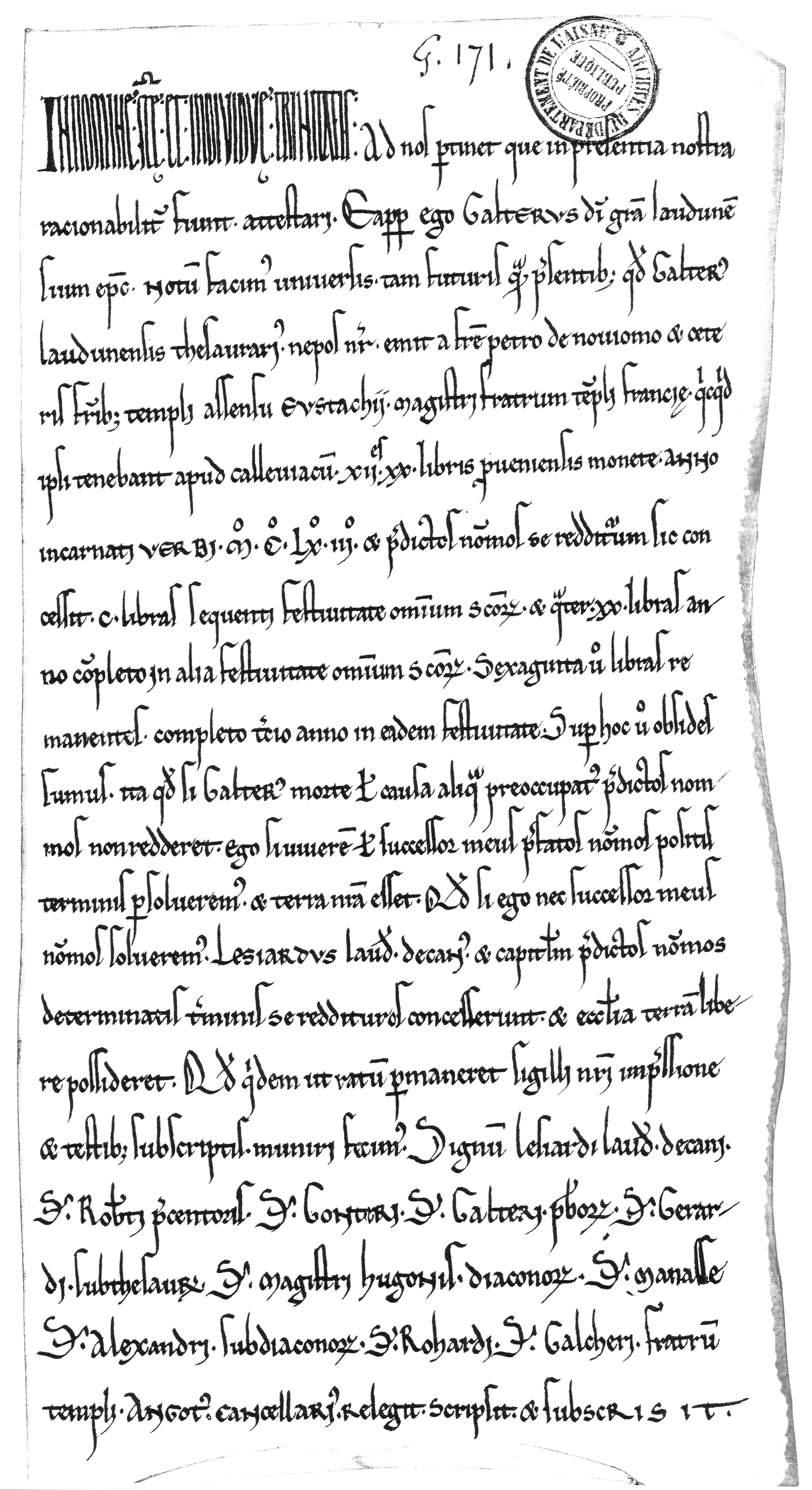 Acte d'achat des terres de chailvet par l'éveché de Laon